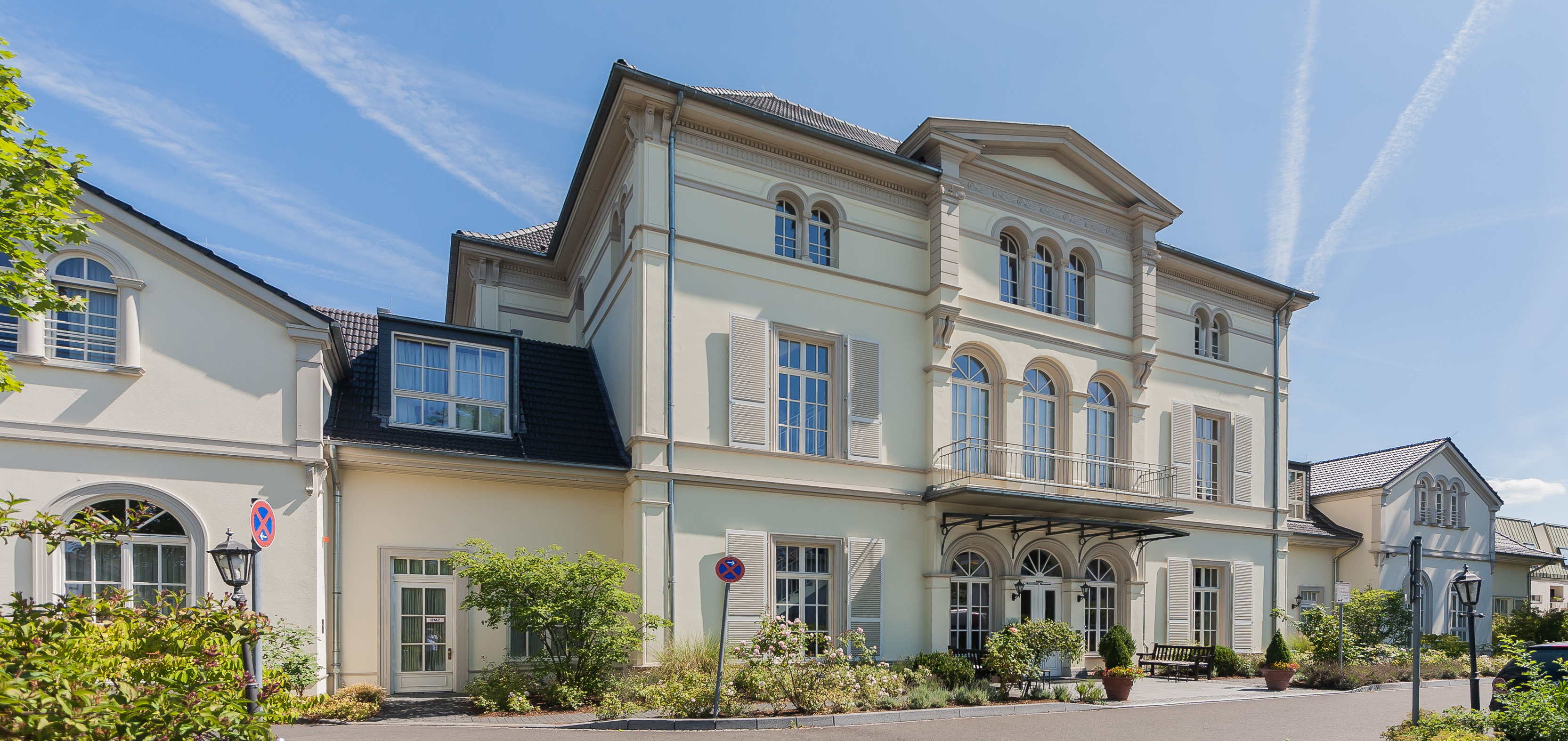 Villa Camphausen, Mainzer Straße 233, Bonn